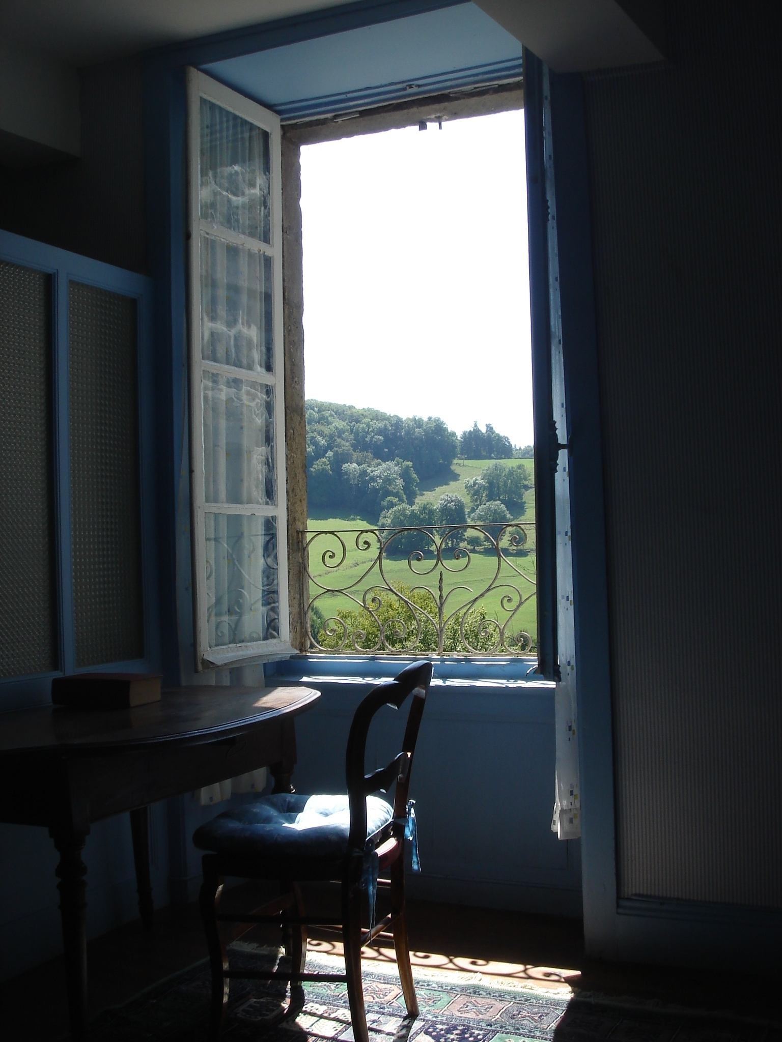 Détail fenetre chambre bleue. Chateau Messac Reilhac (15) France